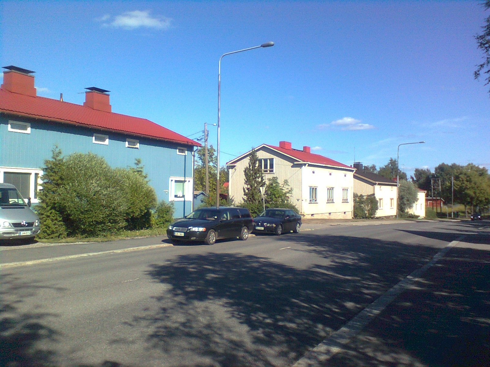 Nekalantie Tampereen Nekalassa.